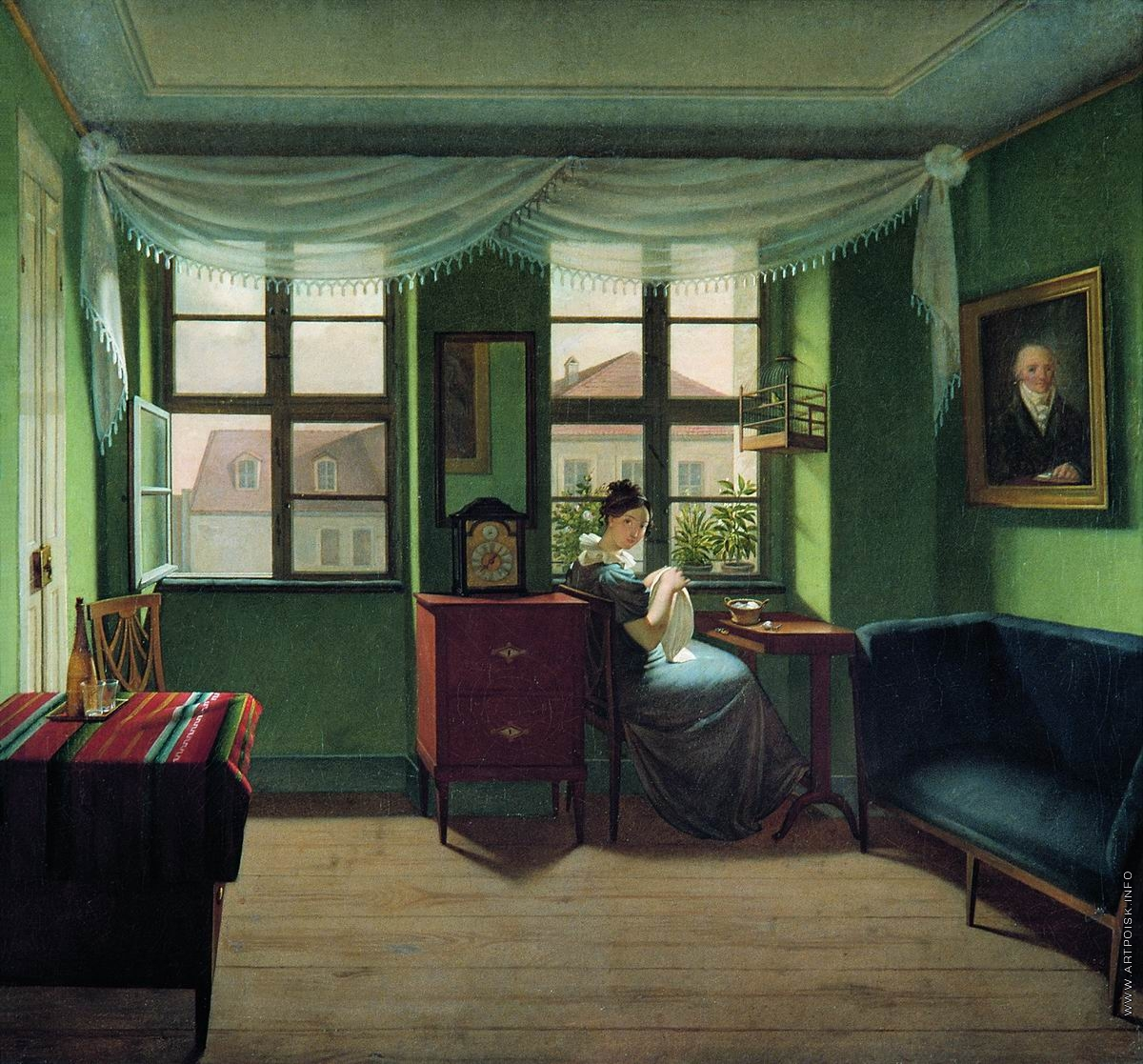 За шитьём. В комнатах Государственная Третьяковская галерея